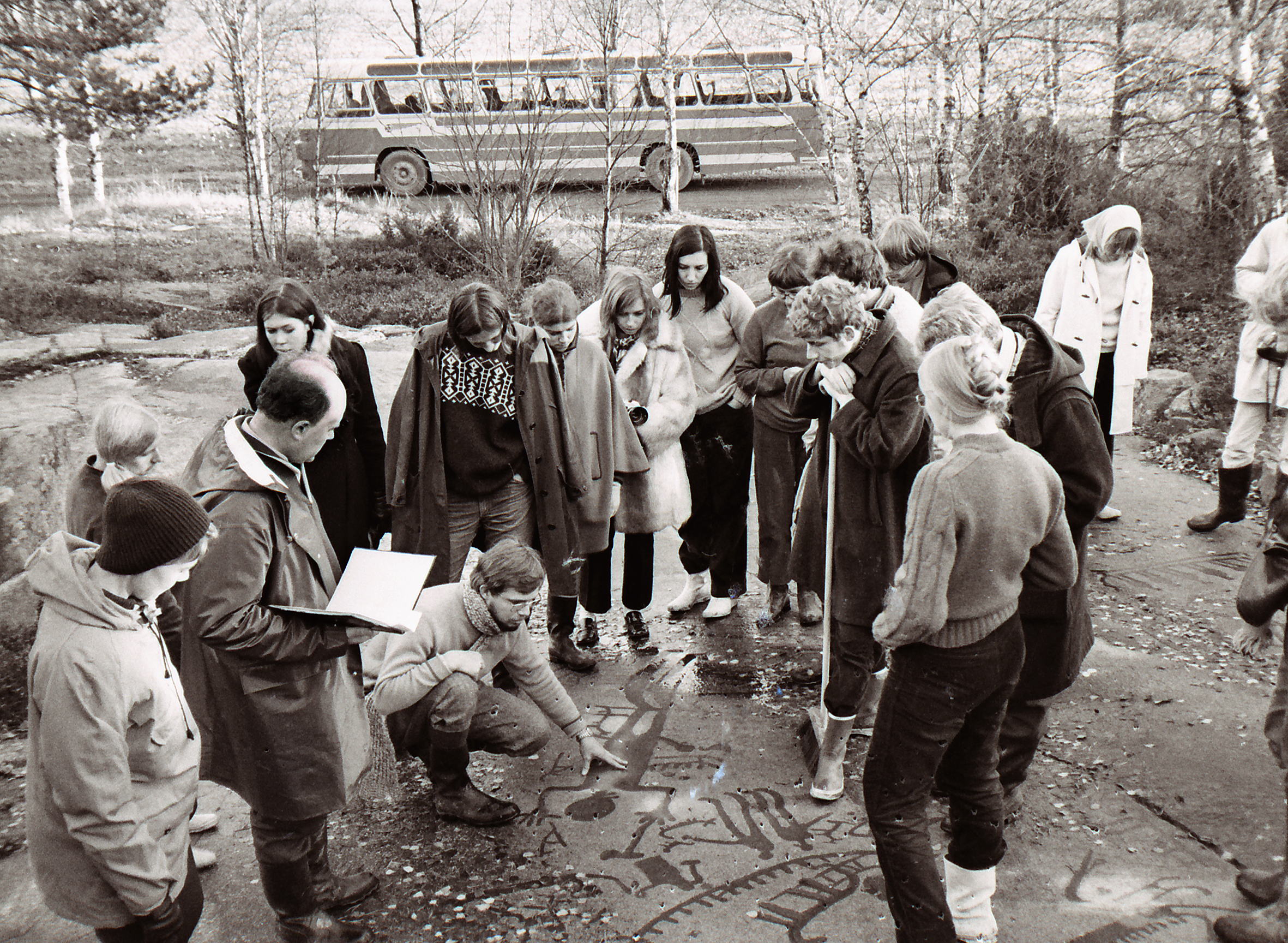 Professor Mats P Malmer (med pärmen) med arkeologstudenter på "Skomakarhällen" (Raä-nr Brastad 1:1) i Bohuslän 1970.